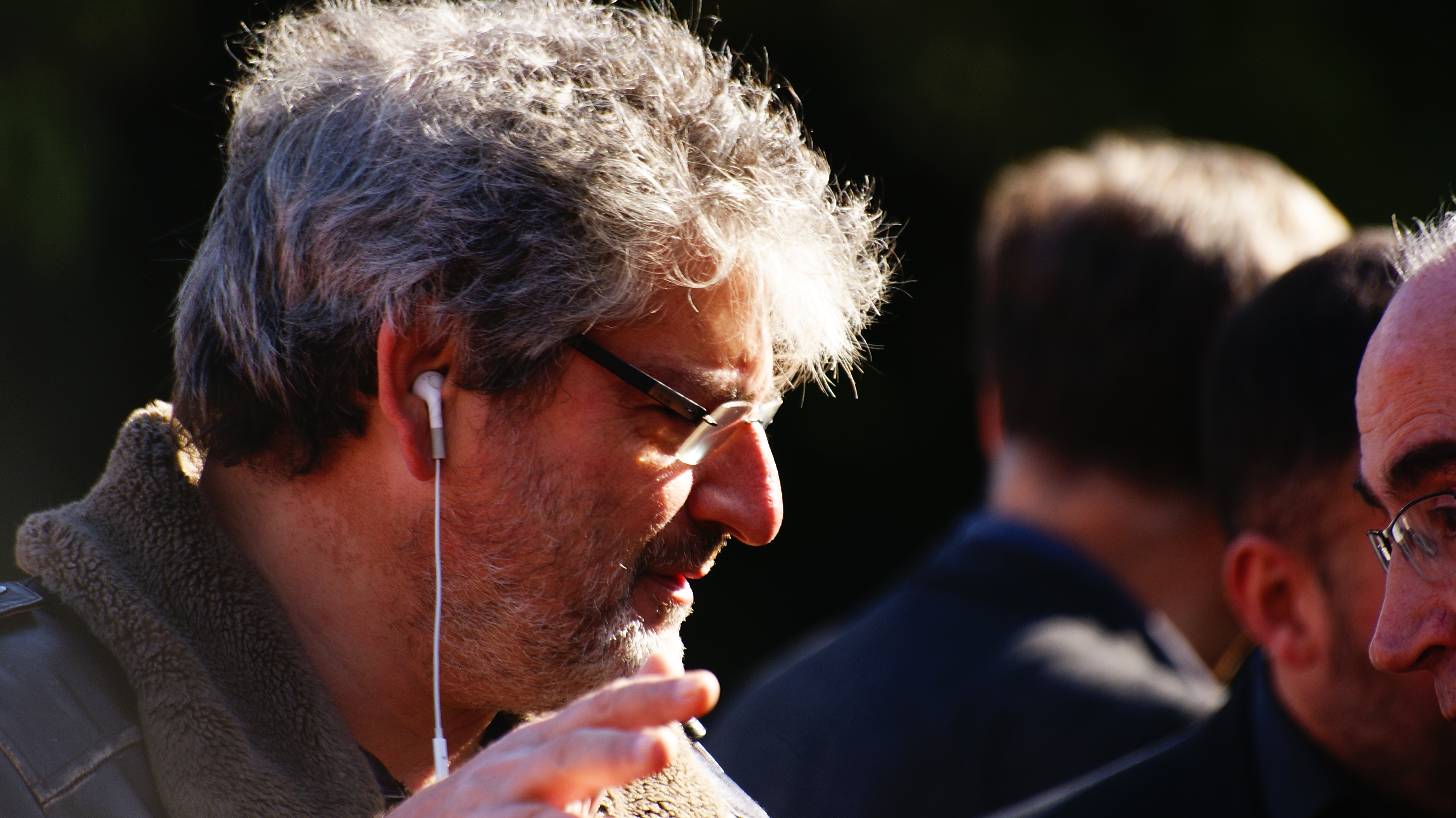 Manuel Huerga a l'acte de presentació dels nominats dels IV premis Gaudí de Cinema Manuel Huerga in the event of presentation of the nominees of the IV Gaudí Awards